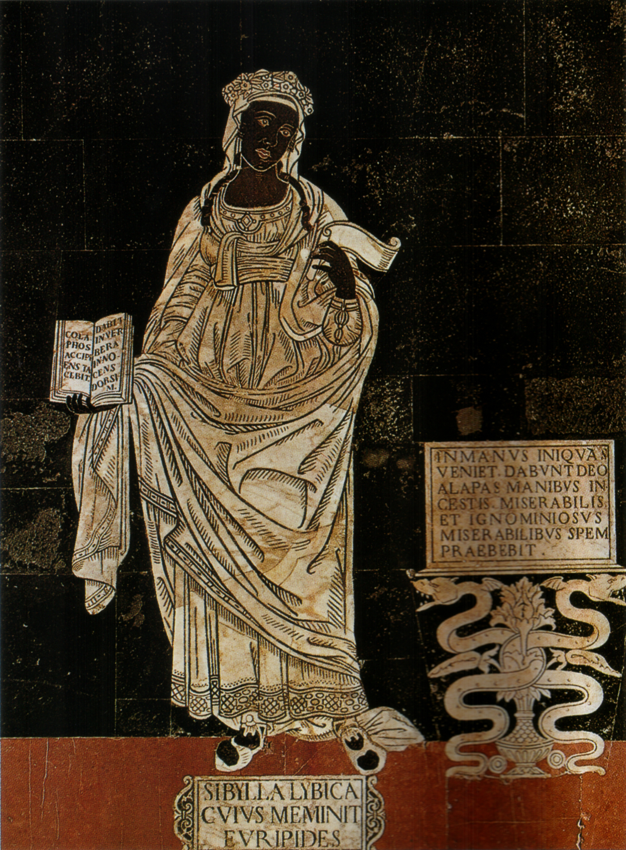 Pavimento di siena, sibilla libica